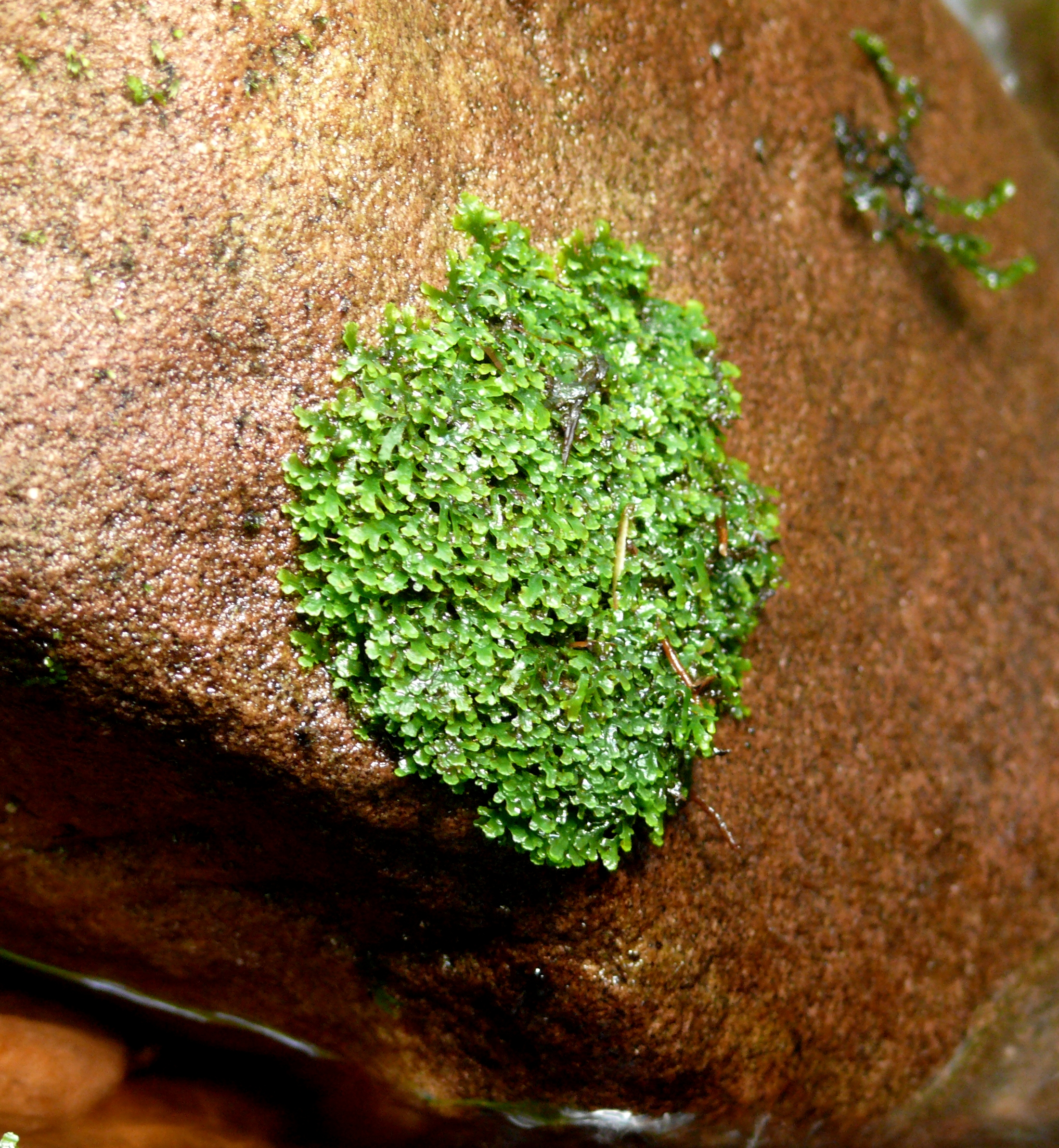 Riccardia chamaedryfolia, Nordschwarzwald